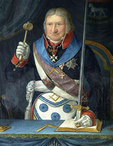 Oljemaleri som viser portrett av Niels Treschow som Ordførende Mester i St. Johanneslogen St. Olaus t.d. hvide Leopard i Oslo.